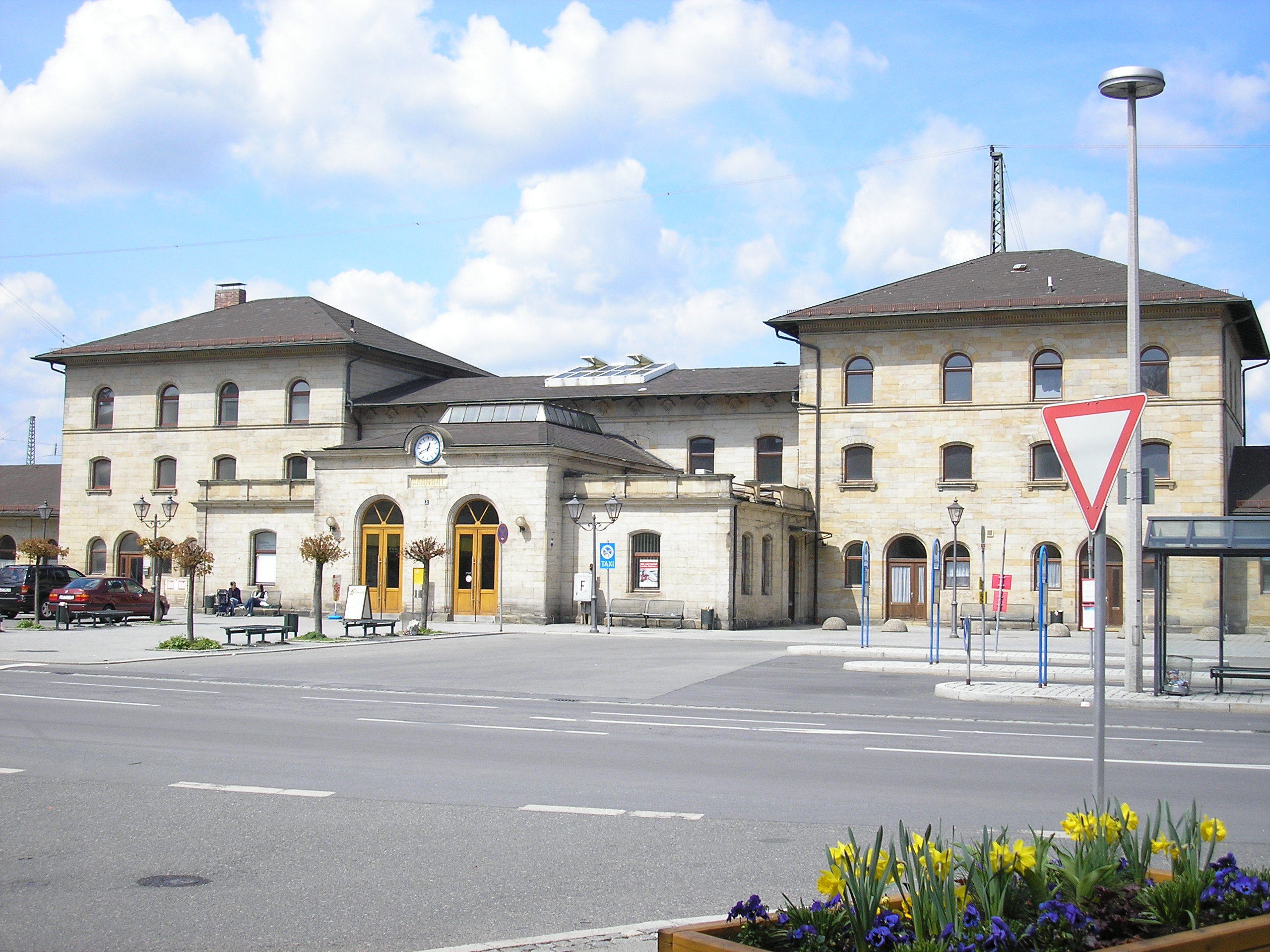 Bahnhof von Lichtenfels (Bayern, Deutschland).